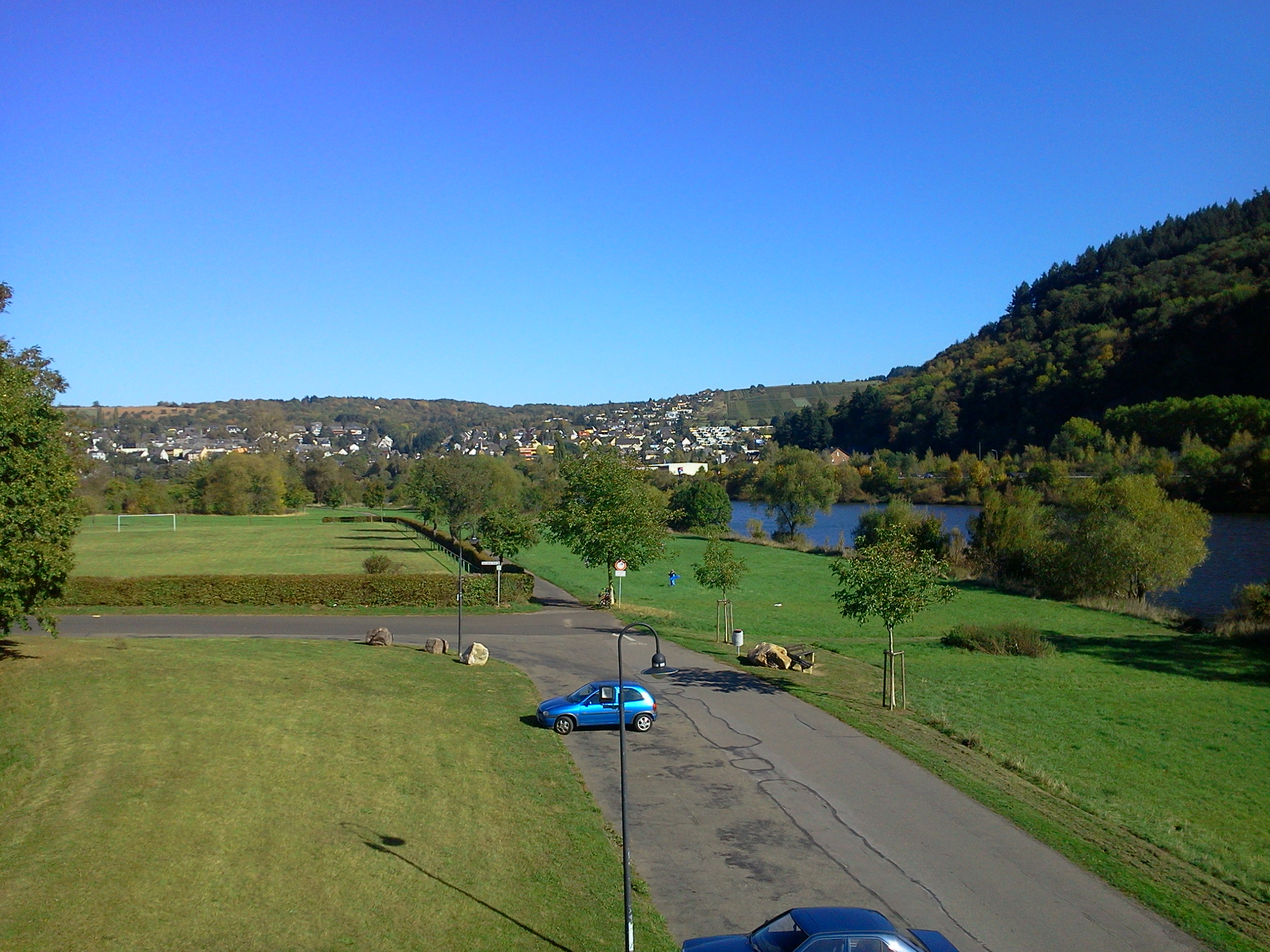 Ausblick von der Wallmauer, rechts ist die Mosel zu sehen, im Hintergrund Ruwer